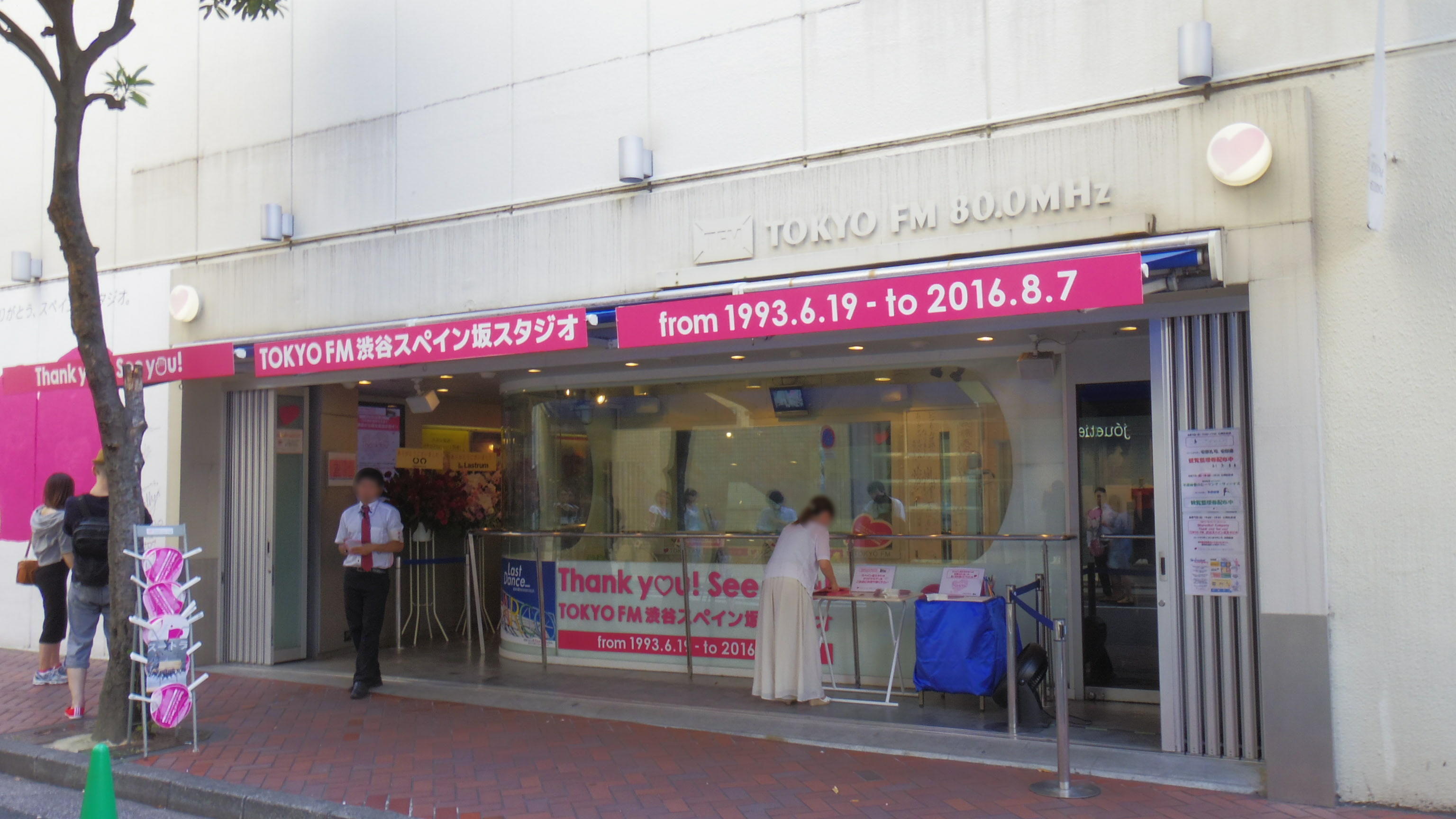 TOKYO FM渋谷スペイン坂スタジオ。渋谷パルコ Part11階にあったTOKYO FMのサテライトスタジオ。1993年6月より生放送番組を中心に放送してきたが、渋谷パルコの改築により2016年8月7日をもって閉鎖、23年の歴史に幕。 最終営業日の2016年8月7日に撮影。Paintgraphic3にて一部人物の顔にぼかし処理。